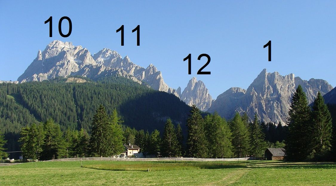 File:2010 Sextener Dolomiten 348 Zehner Elfer Elferschartenspitze Zwölfer Kanzel Einser.jpg (Stundenziffern zugefügt von User:tuvdef